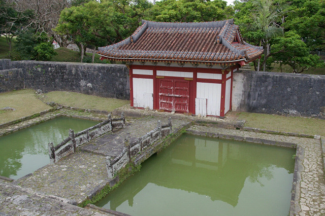 円覚寺跡（総門・放生池・放生橋、沖縄県那覇市）Enkaku-ji (Naha, Okinawa, JAPAN)